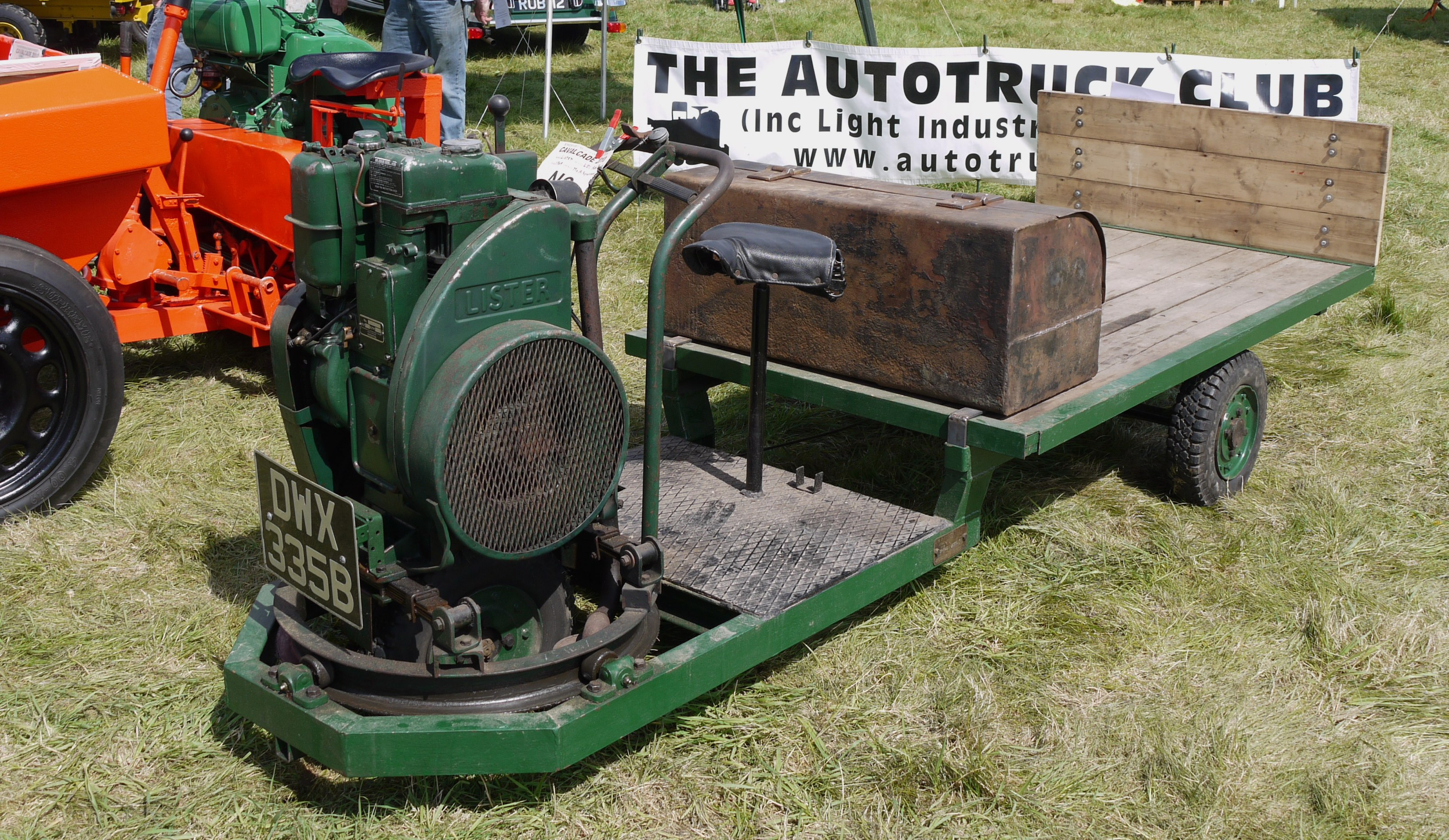 Panasonic G1 14-45 Lens